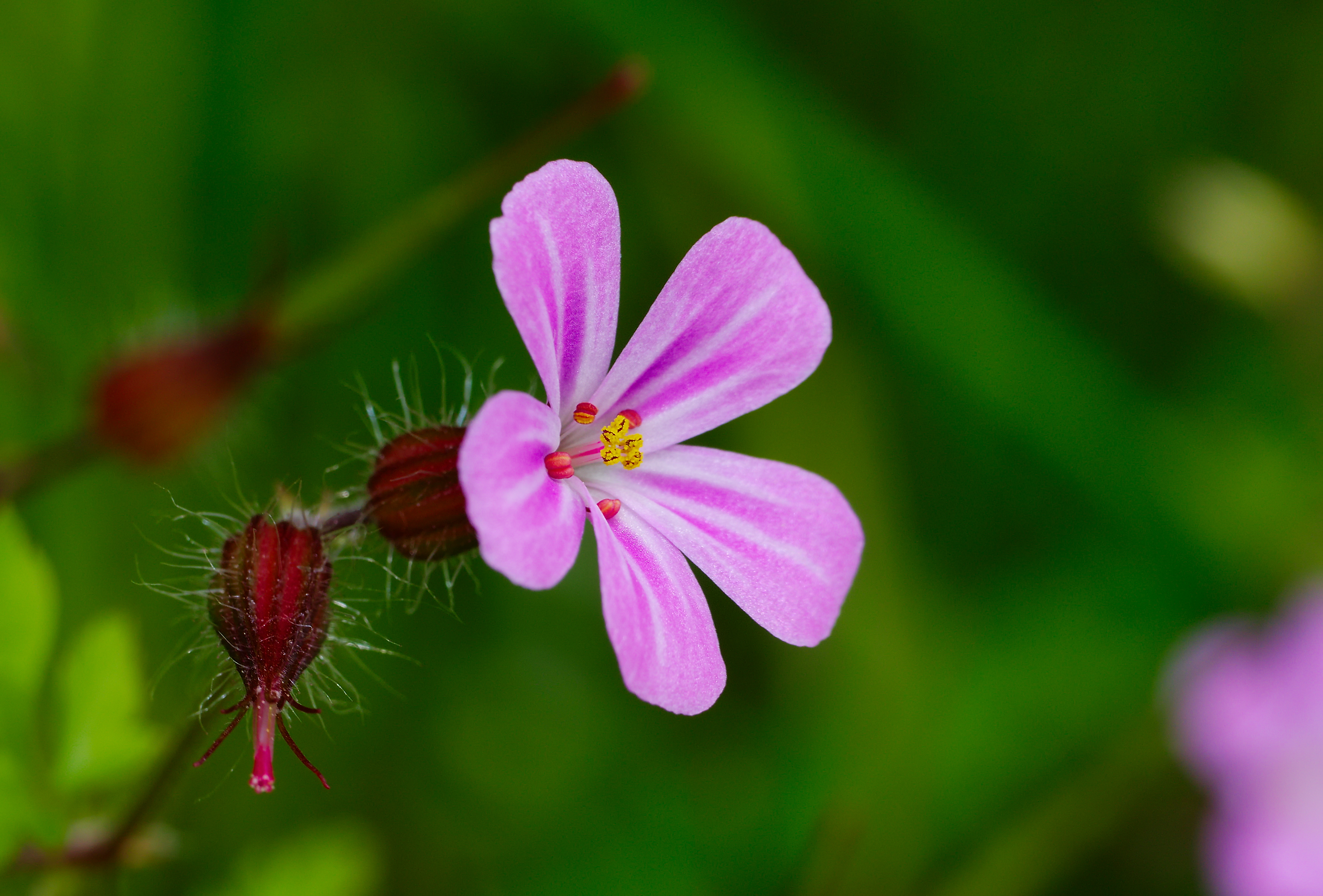 Ruprechts-Storchschnabel - Geranium robertianum. Aufgenommen in Buchklingen (Odenwald), Hessen, Deutschland.